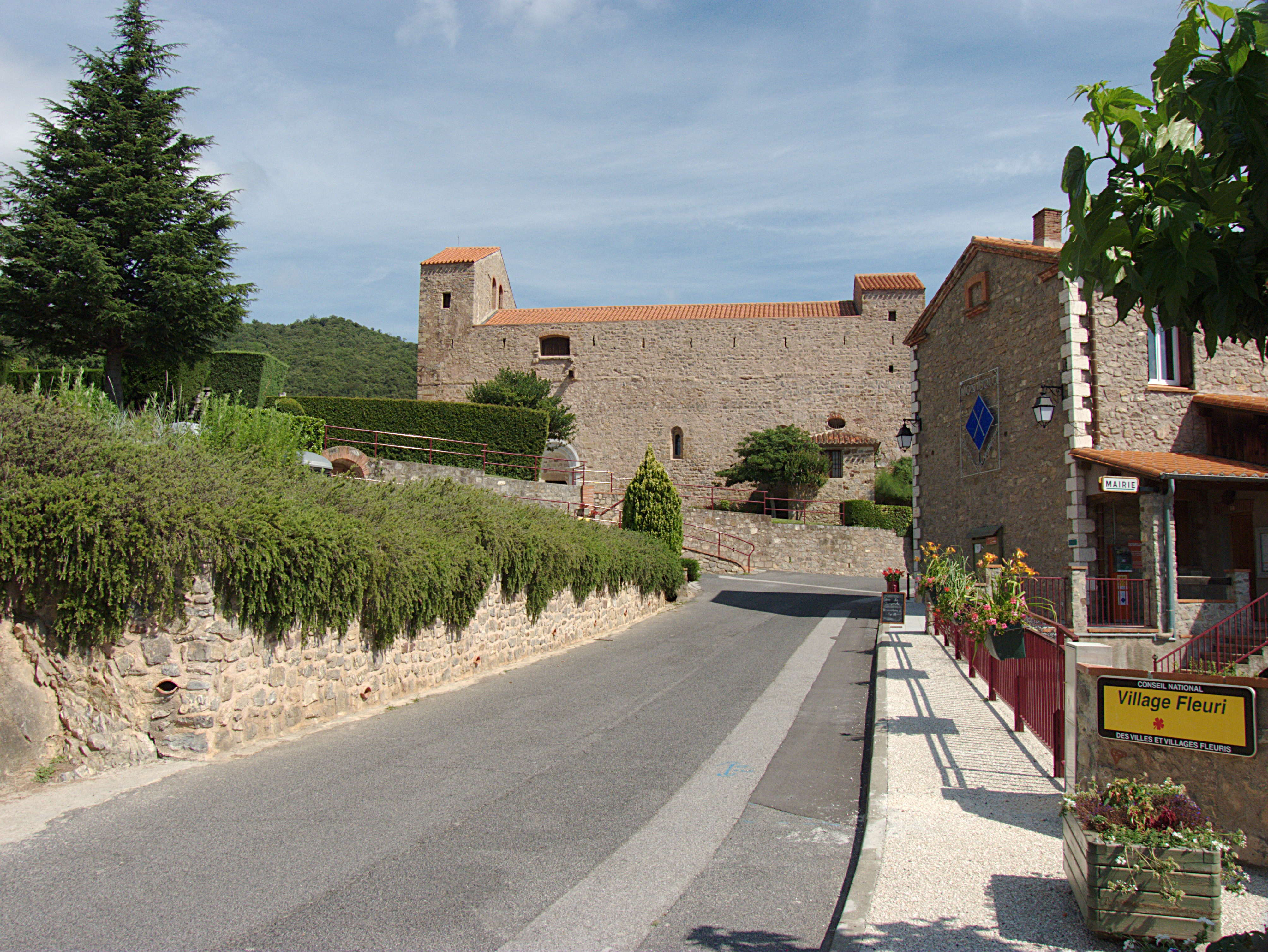 Entrée du village, Pontbolo (Pyrénées-Orientales, Languedoc-Roussillon, France)